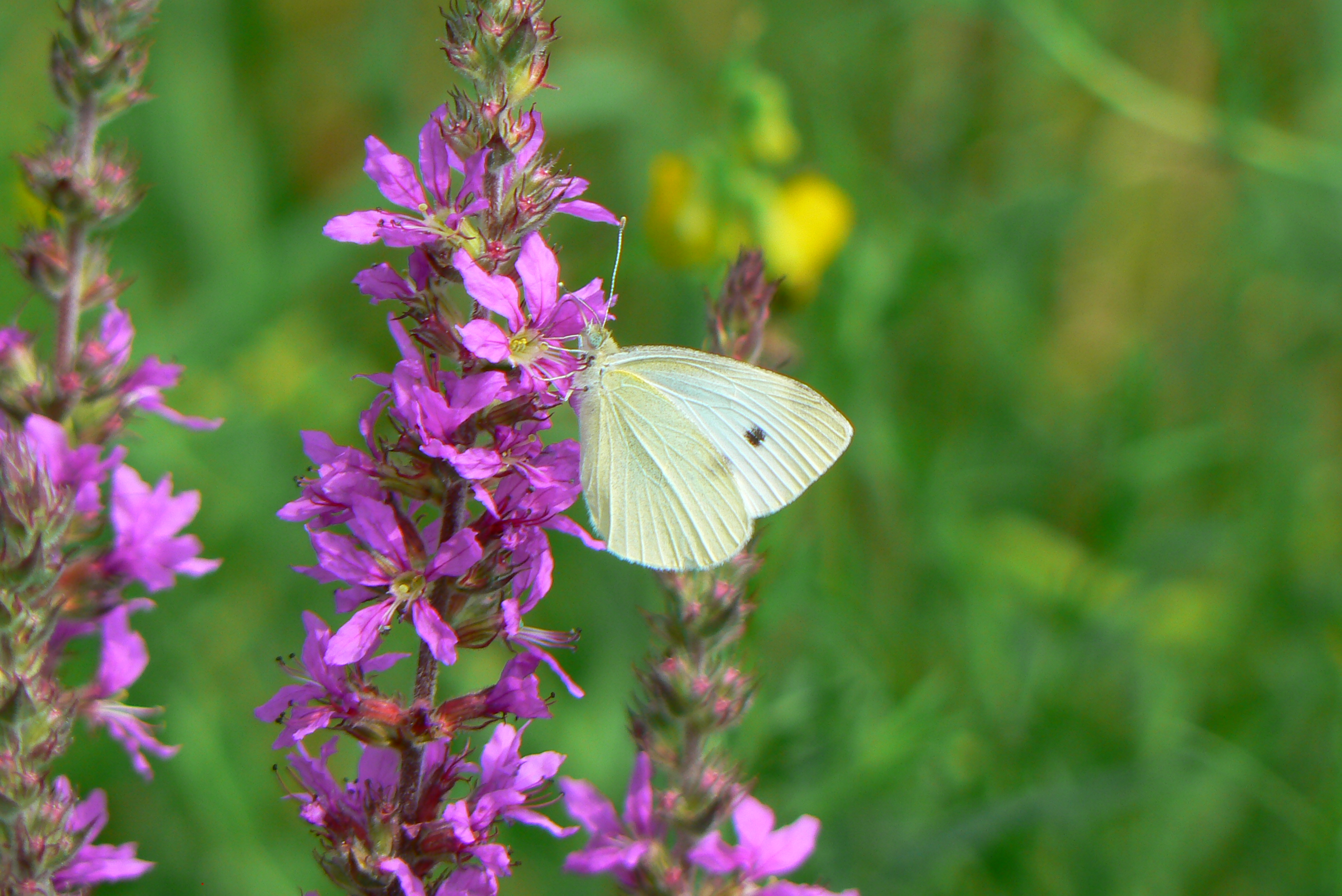 Bělásek zelný